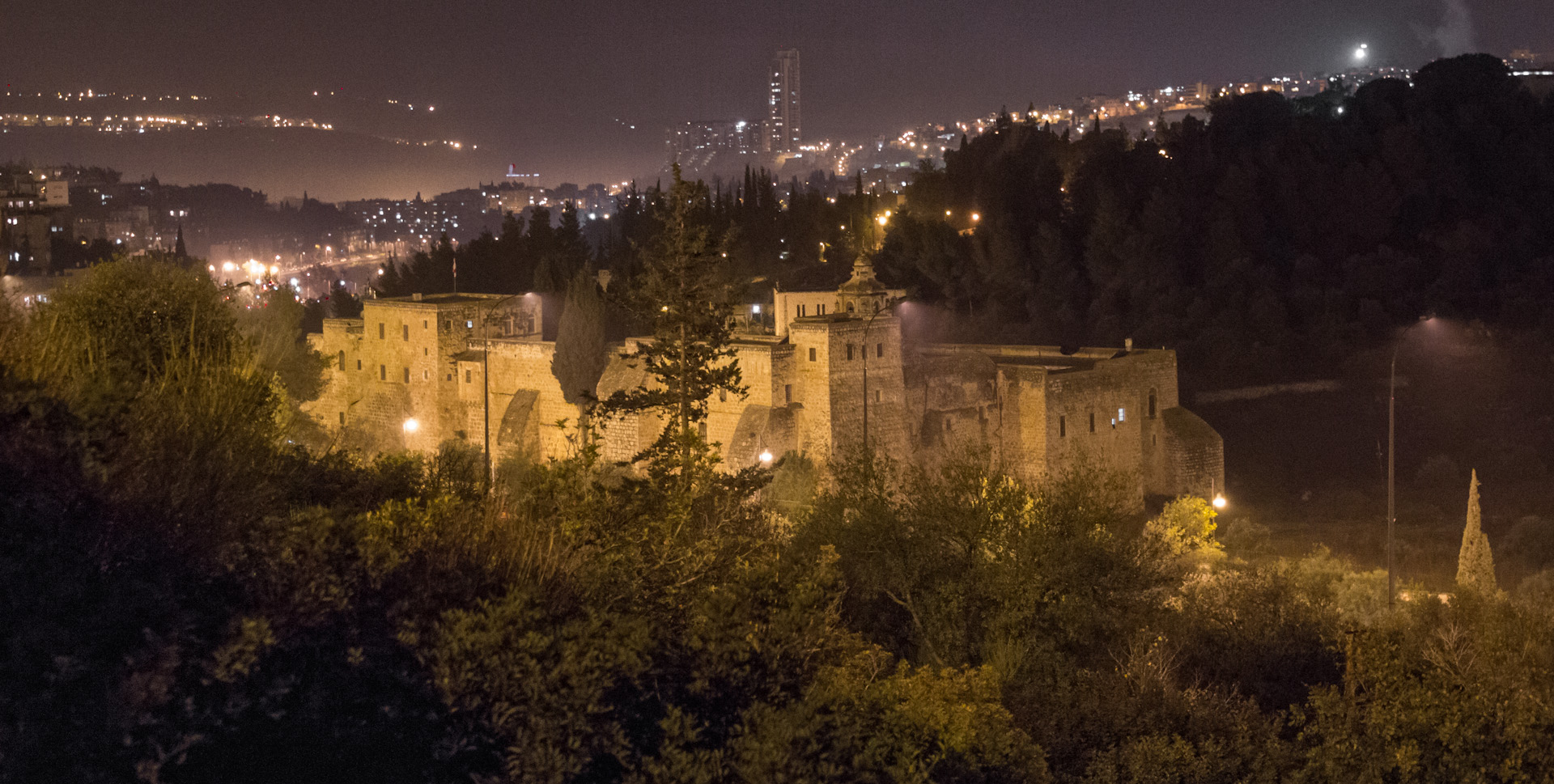 המנזר בעמק המצלבה בלילה